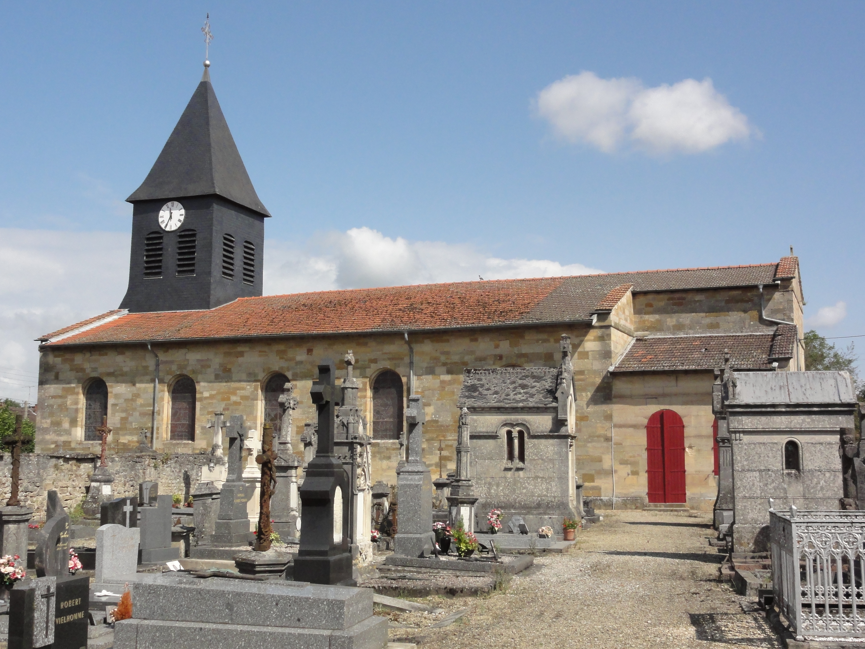 Robert-Espagne (Meuse) église